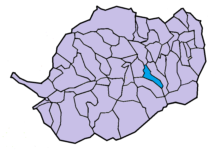 Fillols en el Conflent, a partir del mapa municipal del Conflent de lliure disposició adaptat al Nomenclàtor toponímic aprovat el 2007